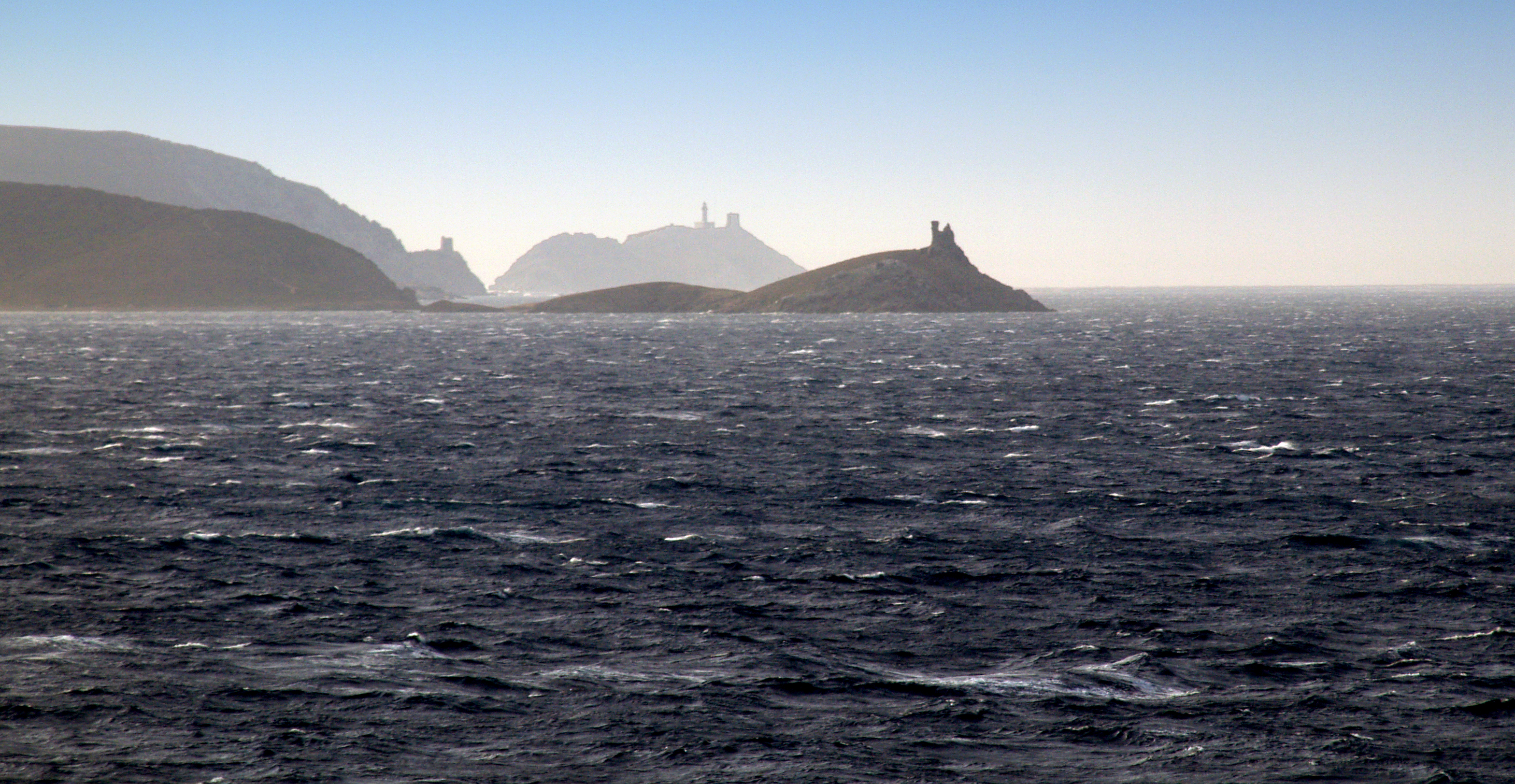 Rogliano (Corsica) - 3 Tours génoises du Nord-est Cap Corse (Îles Finocchiarola, Agnello et Île de la Giraglia).